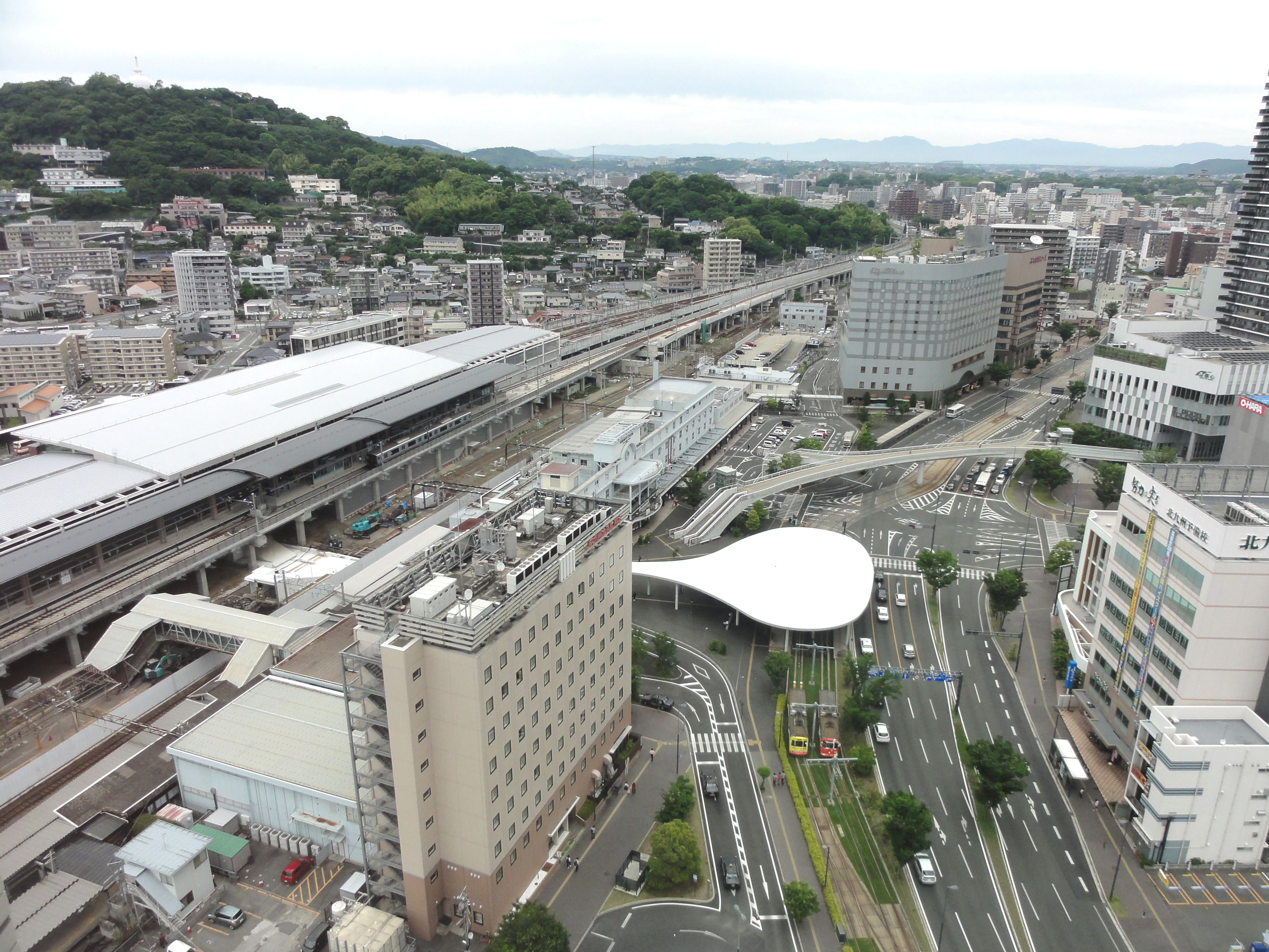 熊本駅東側の様子